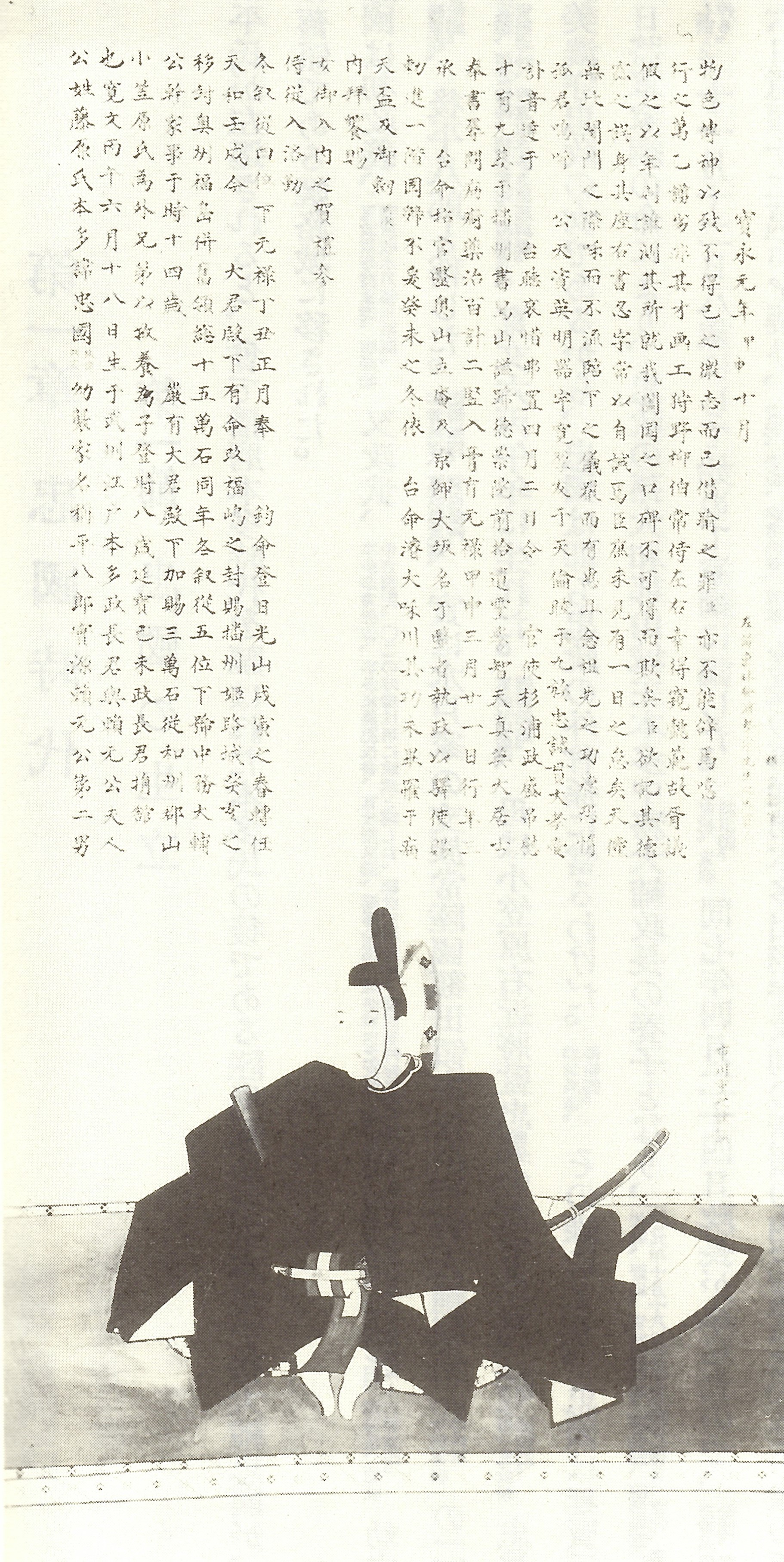 本多忠国の肖像。